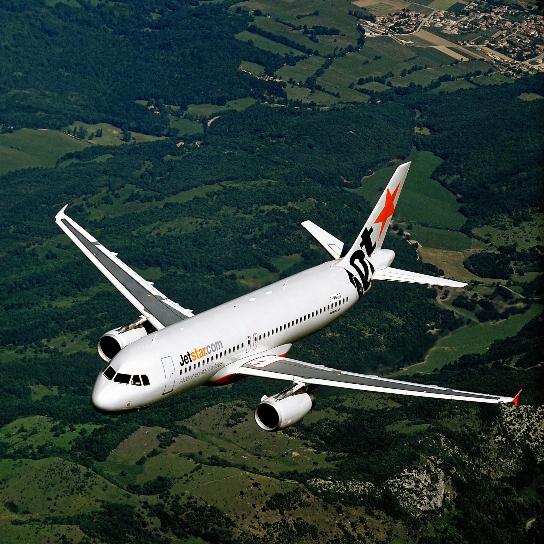 Ein Airbus A320-200 von Jetstar während des Fluges über Frankreich